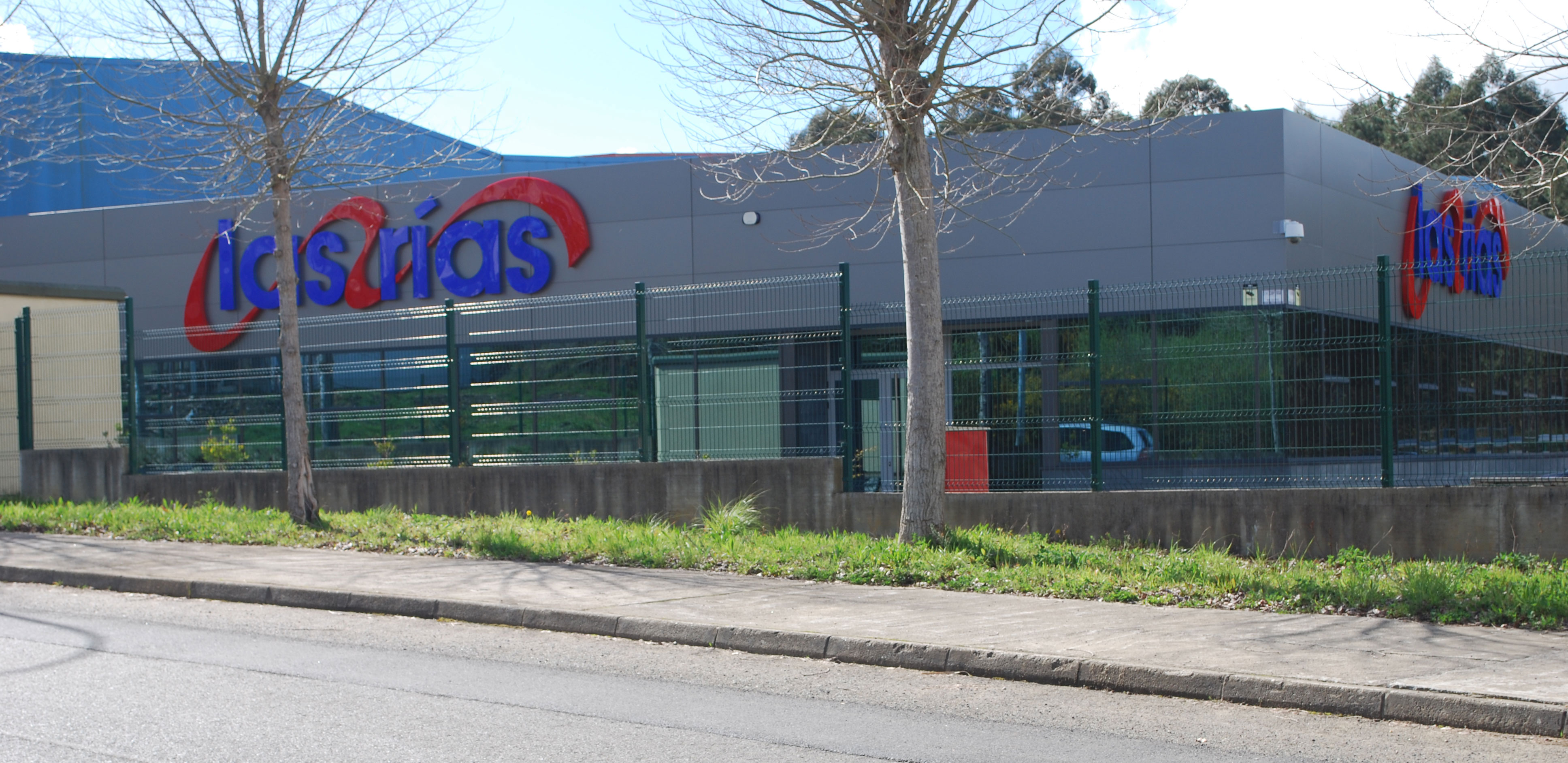 Isidro de la Cal polígono Espíritu Santo A Coruña Galiza Spain